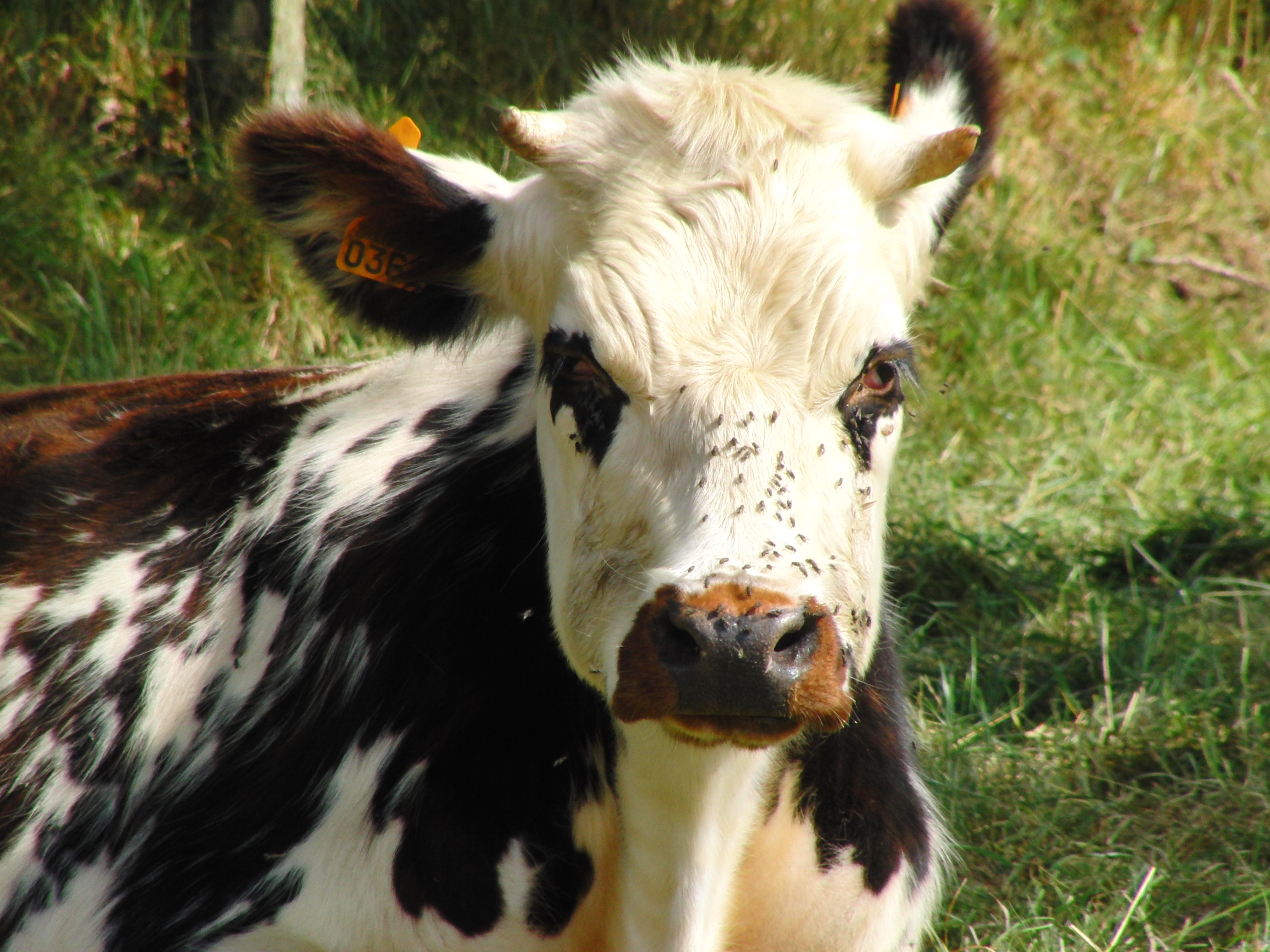 Tête d'une jeune vache normande, Domfront, Orne, France